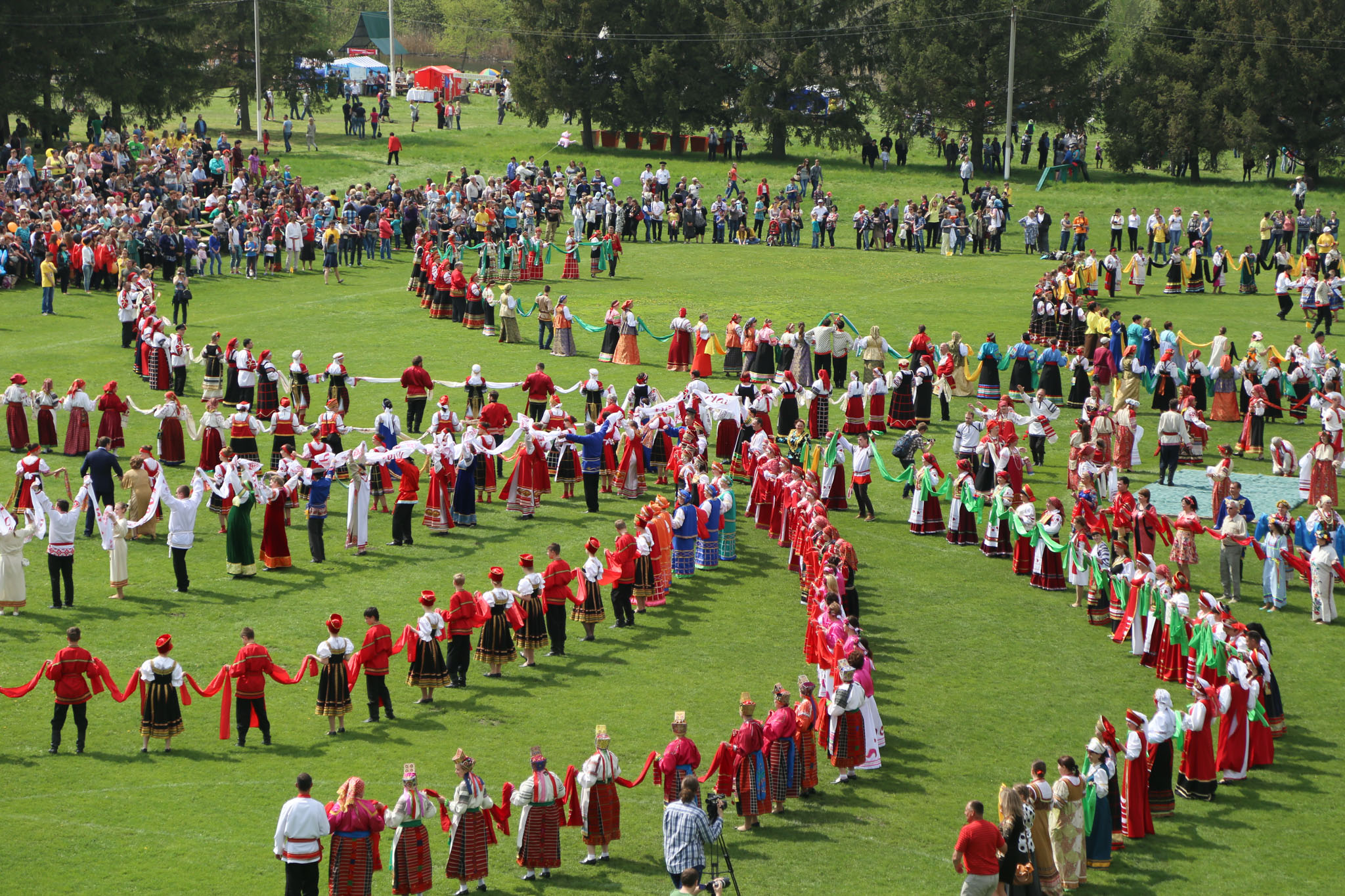 Фестиваль «Узорный хоровод 2015» 2 мая 2015 в городе Грайворон Белгородской области. Мировой рекорд — в узорном хороводе участвовал 2511 человек — это самый массовый танец на планете.